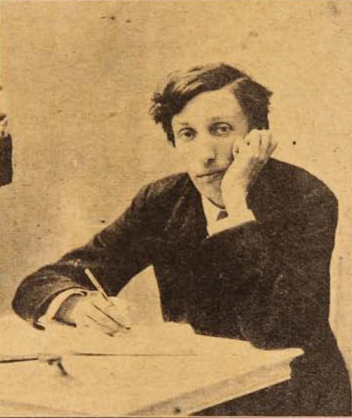 Daniel de la Vega Uribe en 1917. Daniel de la Vega (Quilpué, 30 de junio de 1892 - Santiago de Chile, 29 de julio de 1971) fue un poeta, dramaturgo, cronista y novelista chileno.